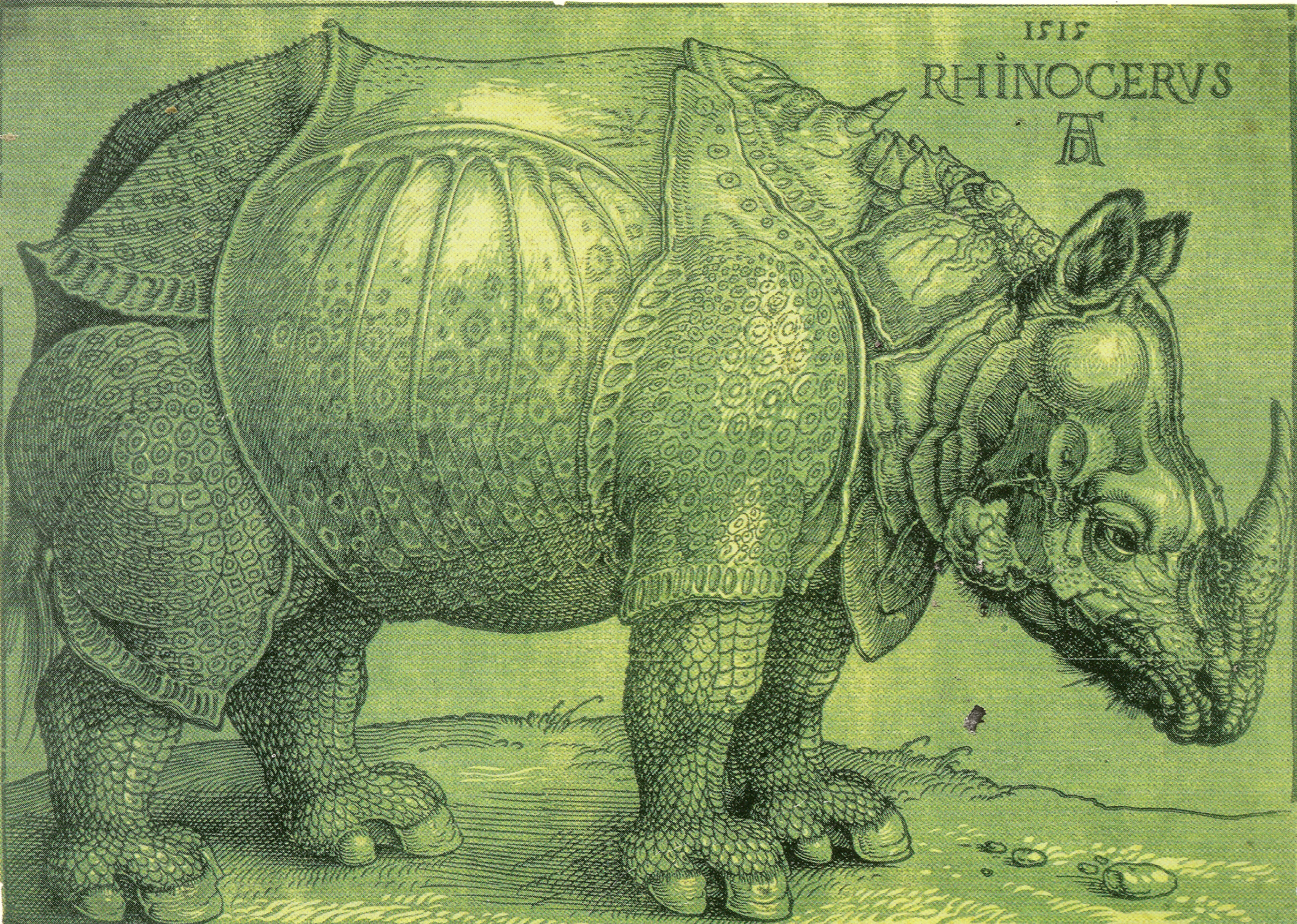 Rhinozeros